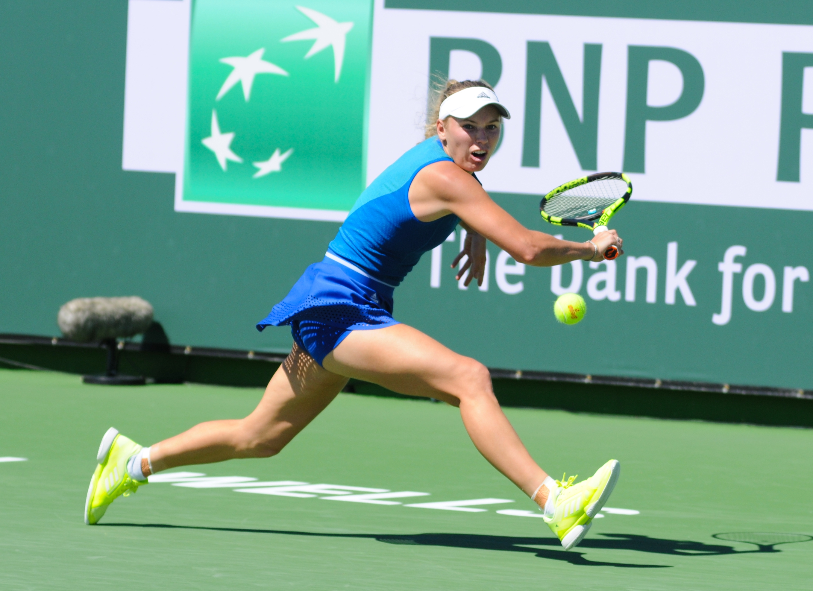 2017 BNP Paribas Open